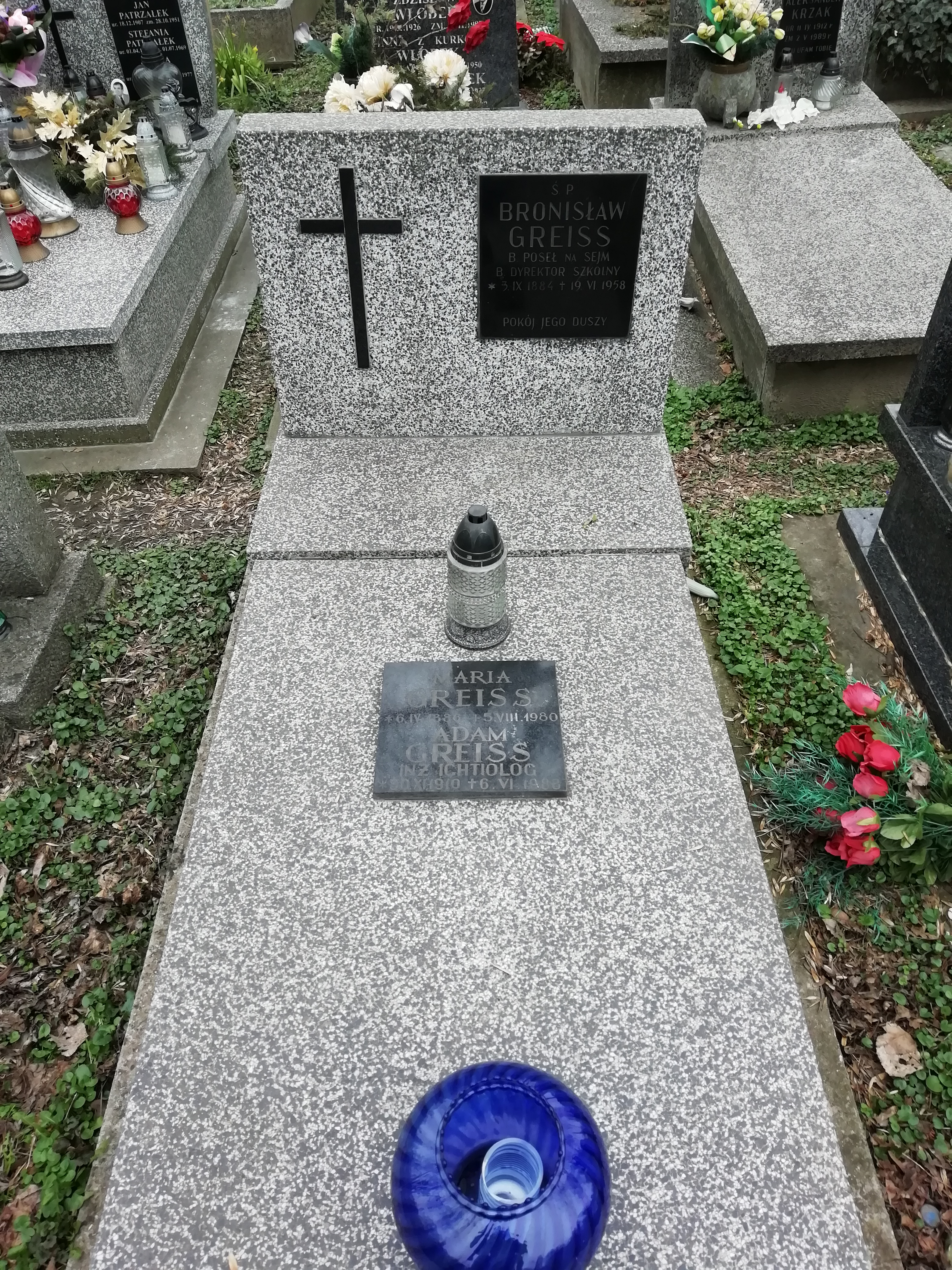 Cmentarz Rakowicki, Kraków